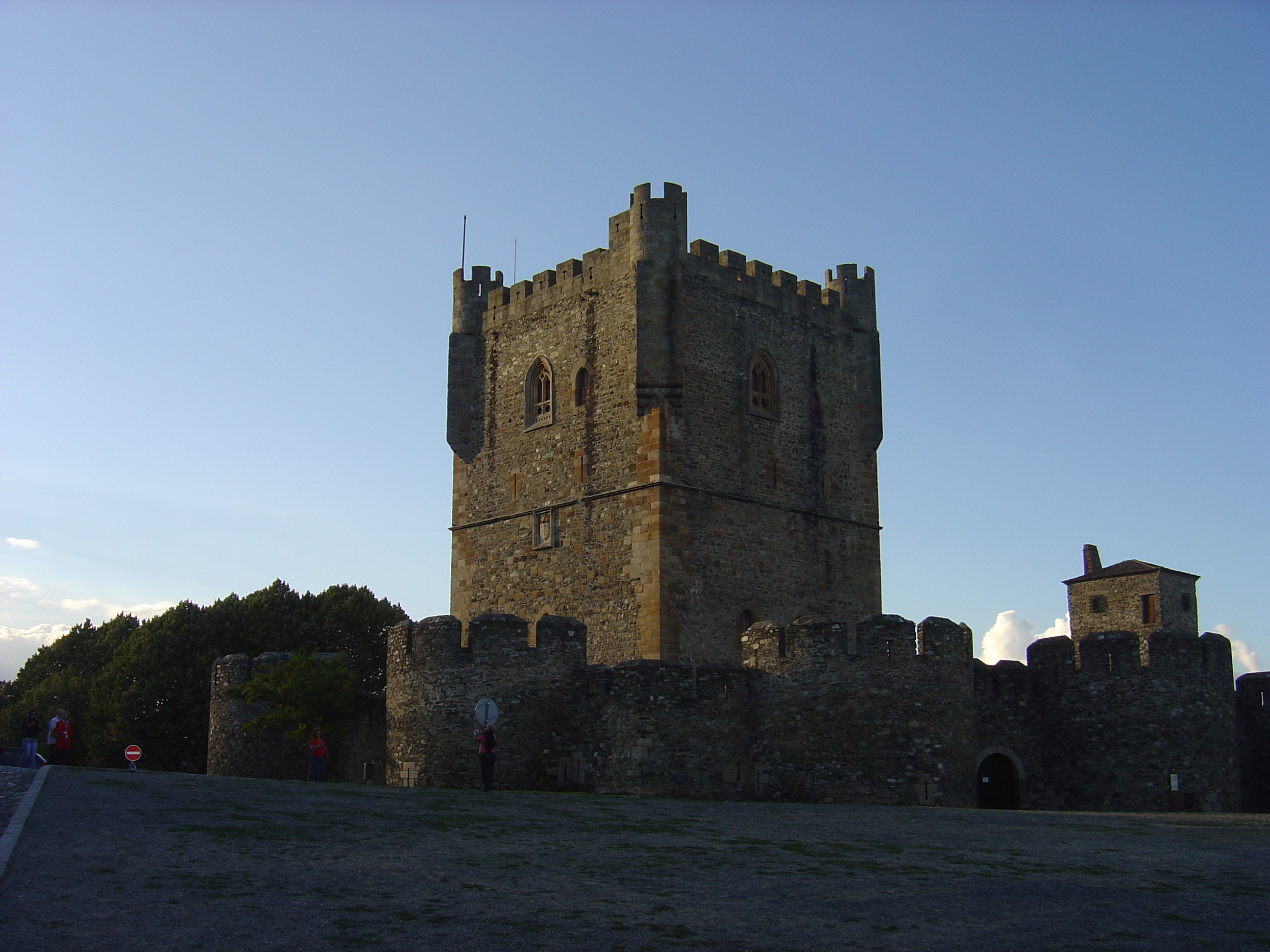 Bragança Castle, Portugal